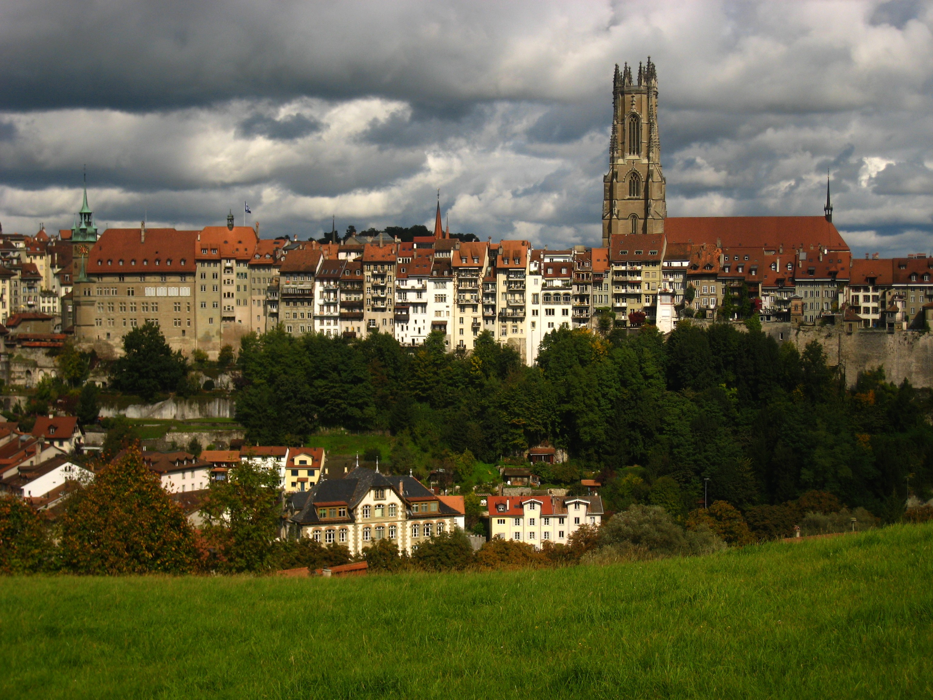 Switzerland - Freiburg/Fribourg - St-Nicolas Church